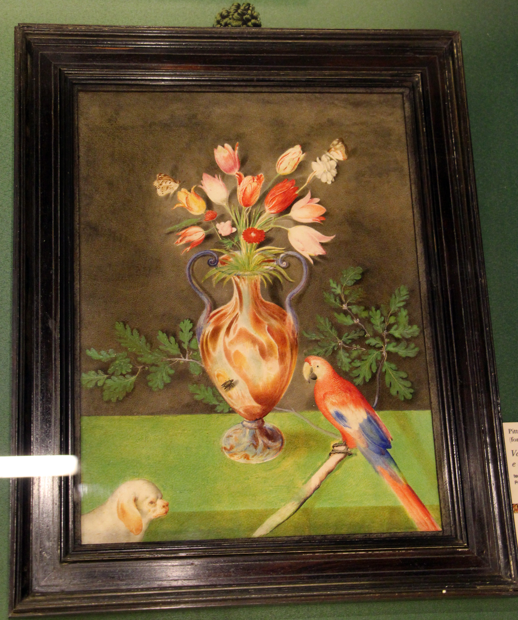 Villa medicea di Poggio a Caiano - MIBAC The making of this document was supported by Wikimedia CH. (Submit your project!) For all the files concerned, please see the category Supported by Wikimedia CH. This is a photo of a monument which is part of cultural heritage of Italy.